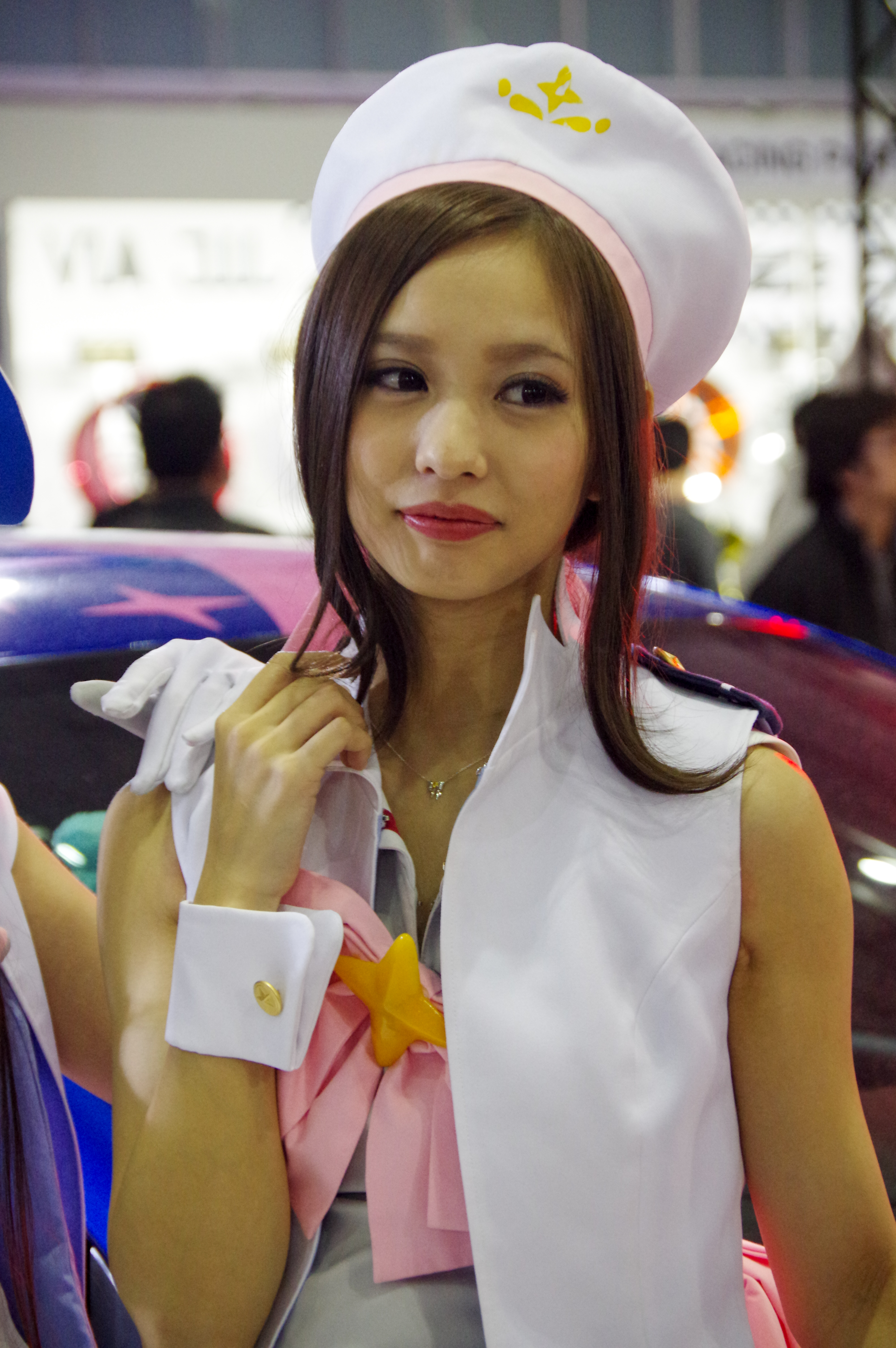 TOKYO AUTO SALON 2016 _94